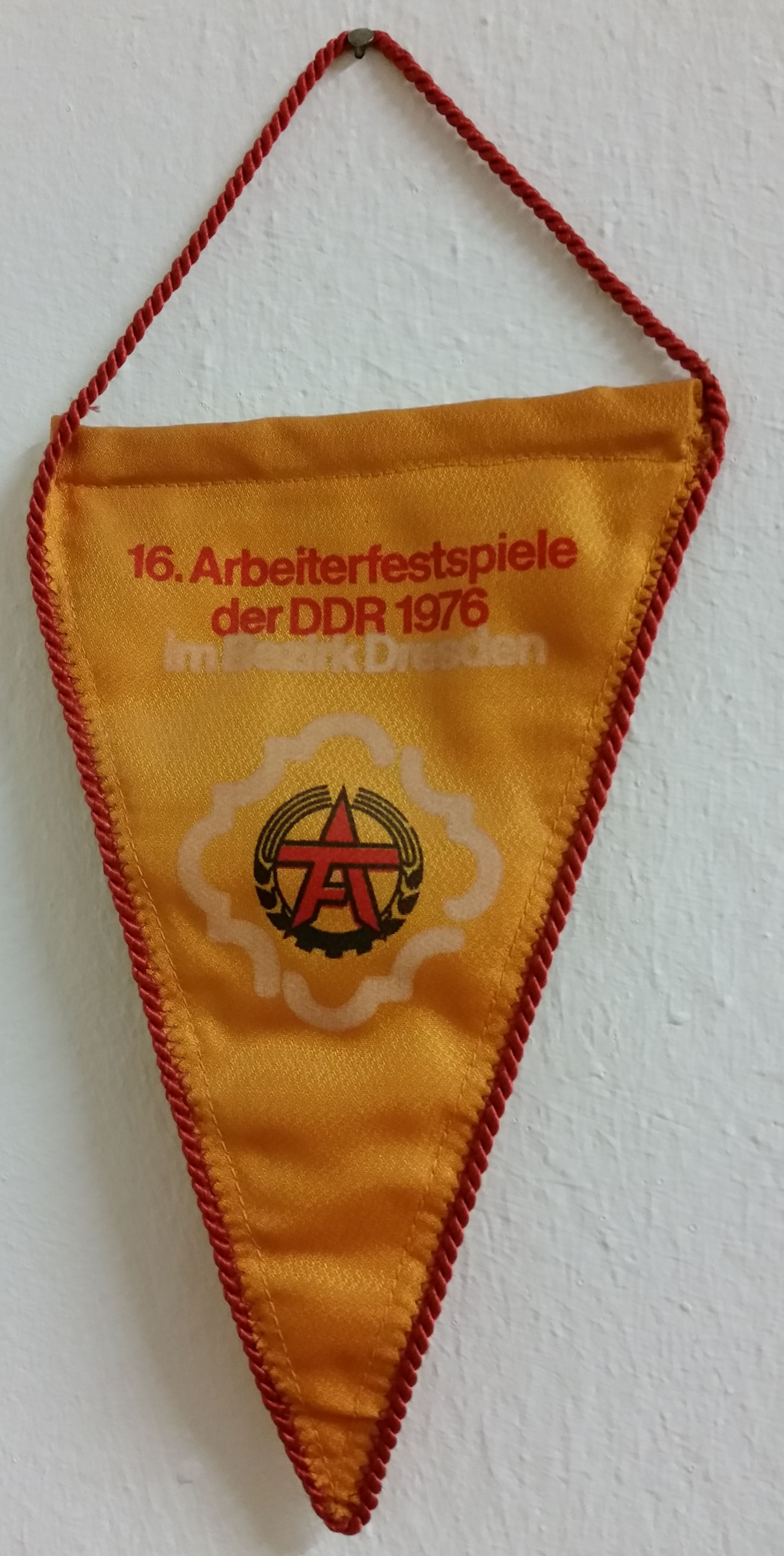 Wimpel zu den 16. Arbeiterfestspielen der DDR 1976 im Bezirk Dresden im DDR-Museum Pirna